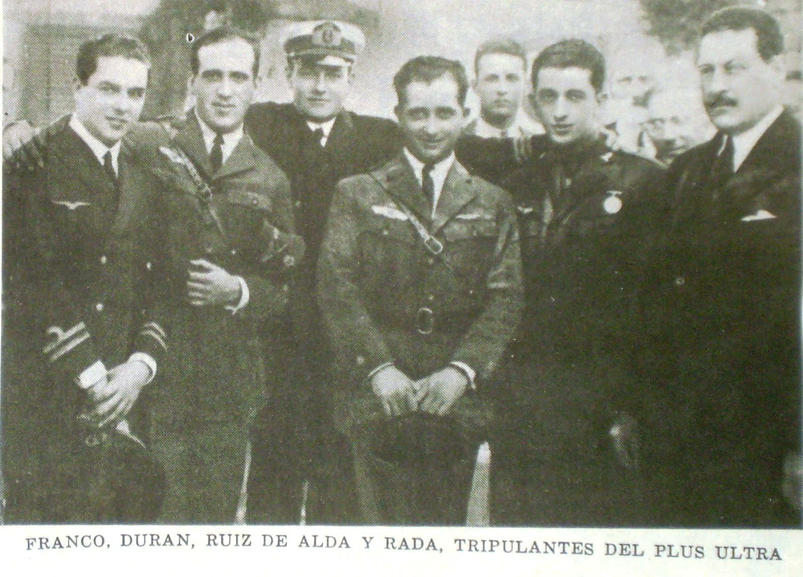 Tripulacion del Plus Ultra